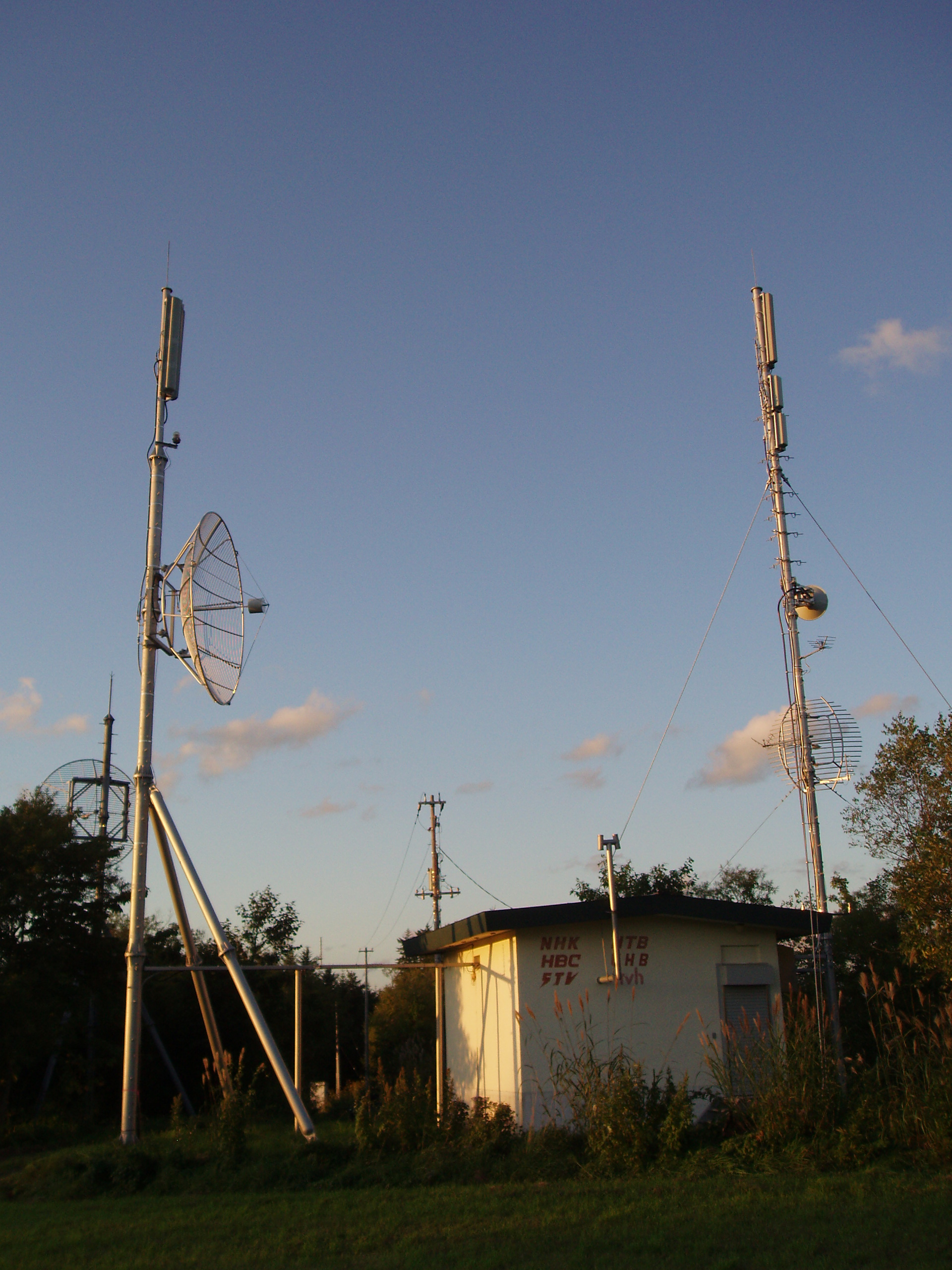 洞爺中継局